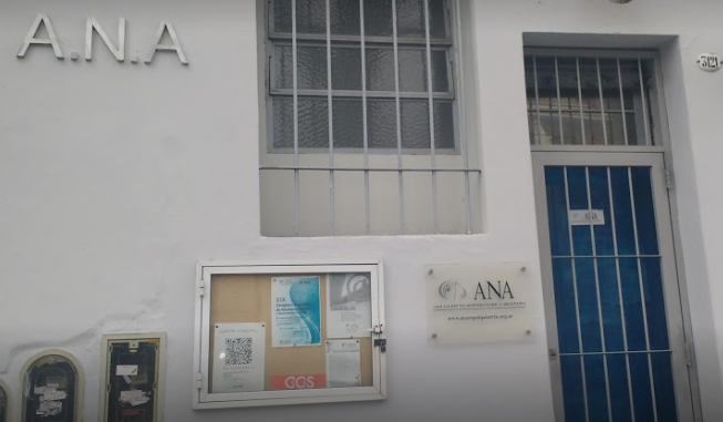 Edificio de la Asociación.